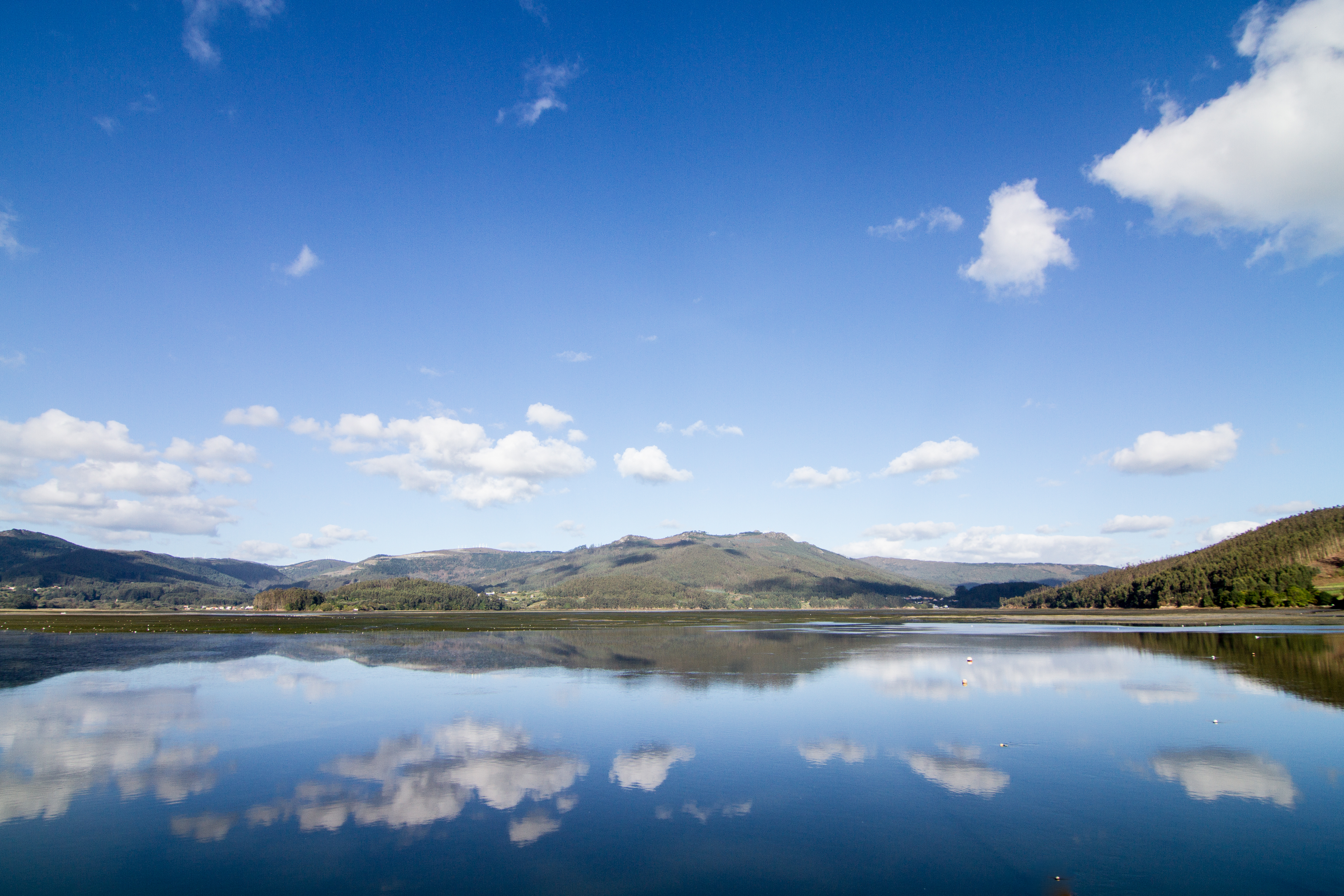 Ortigueira-Mera Vista de la Ría de Ortigueira desde el puerto de Ortigueira This is a photography of a Site of Community Importance in Spain with the ID: ES1110001. Natura2000 entry, EEA entry